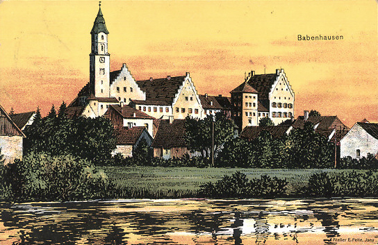 Ansichtskarte Motiv: Babenhausen